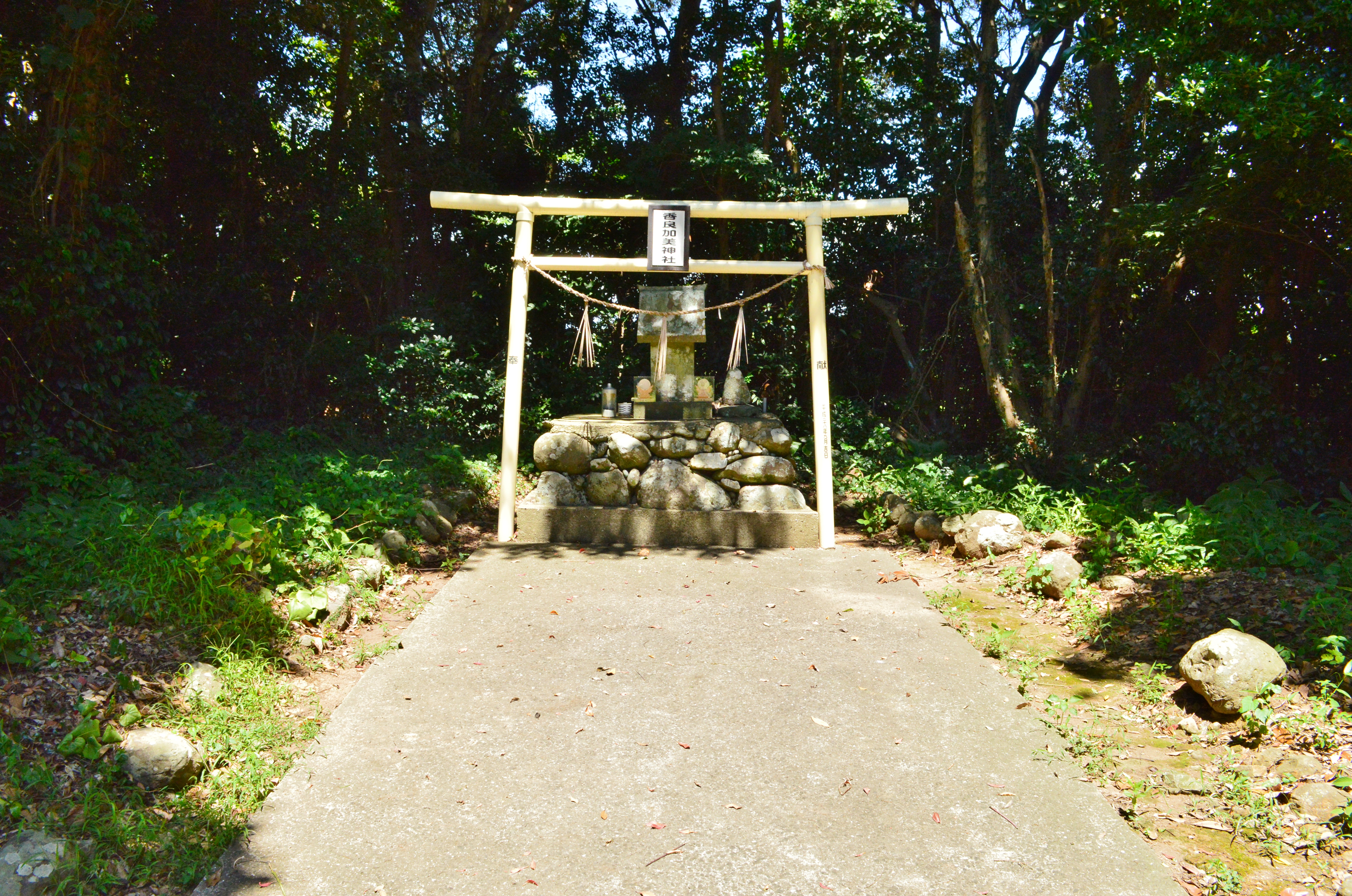 カラカミ遺跡にある祠